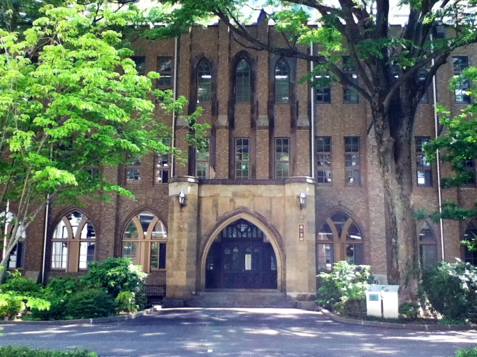 学習院大学南１号館